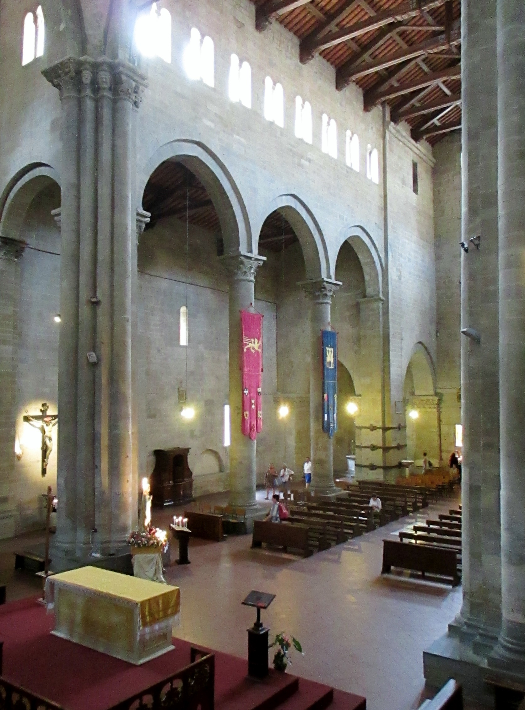 Arezzo, interno di Santa Maria della Pieve; scorcio dal transetto verso la navata destra e la base del campanile.